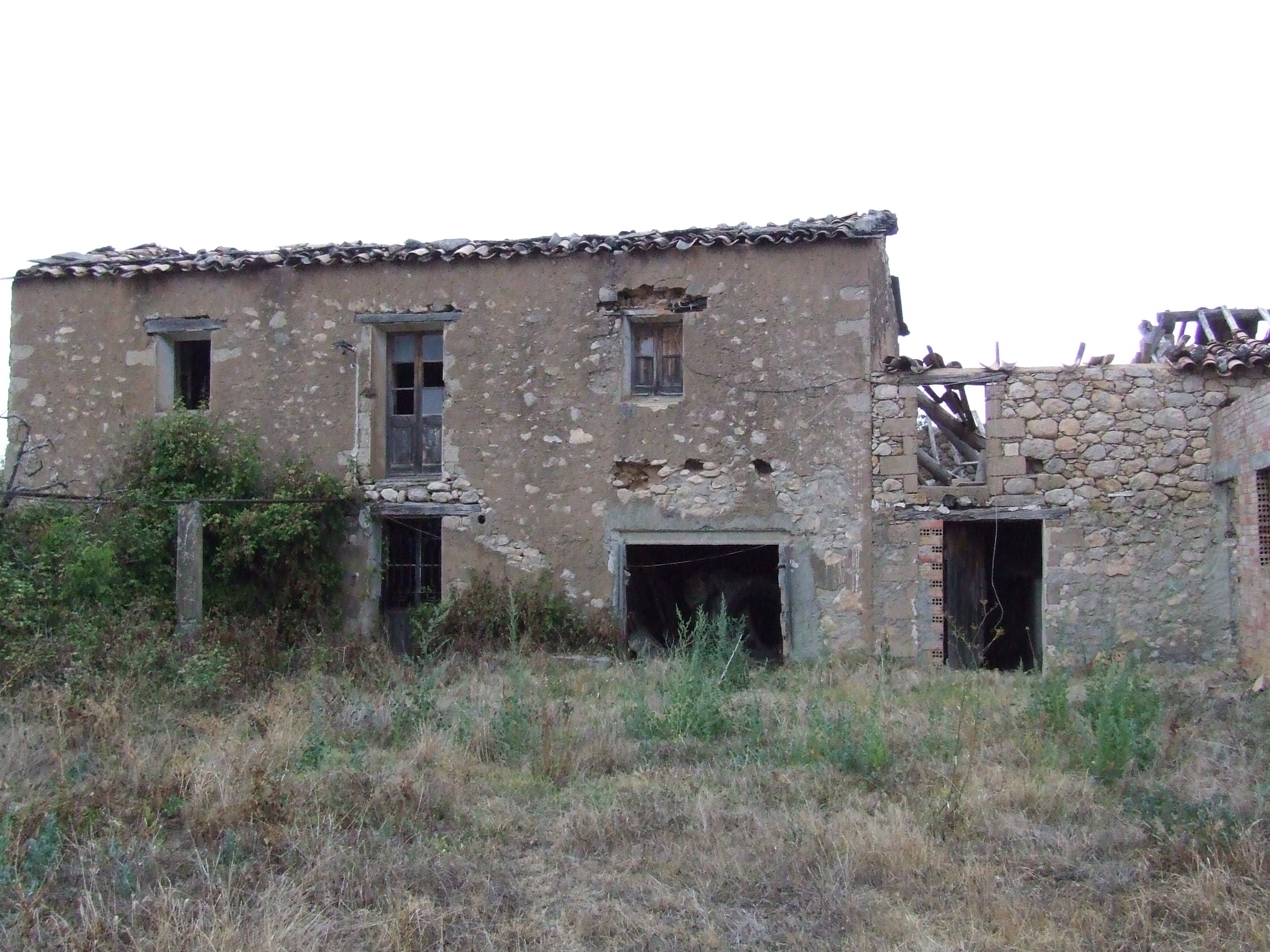 Cal Llenasca (Abella de la Conca, Pallars Jussà)